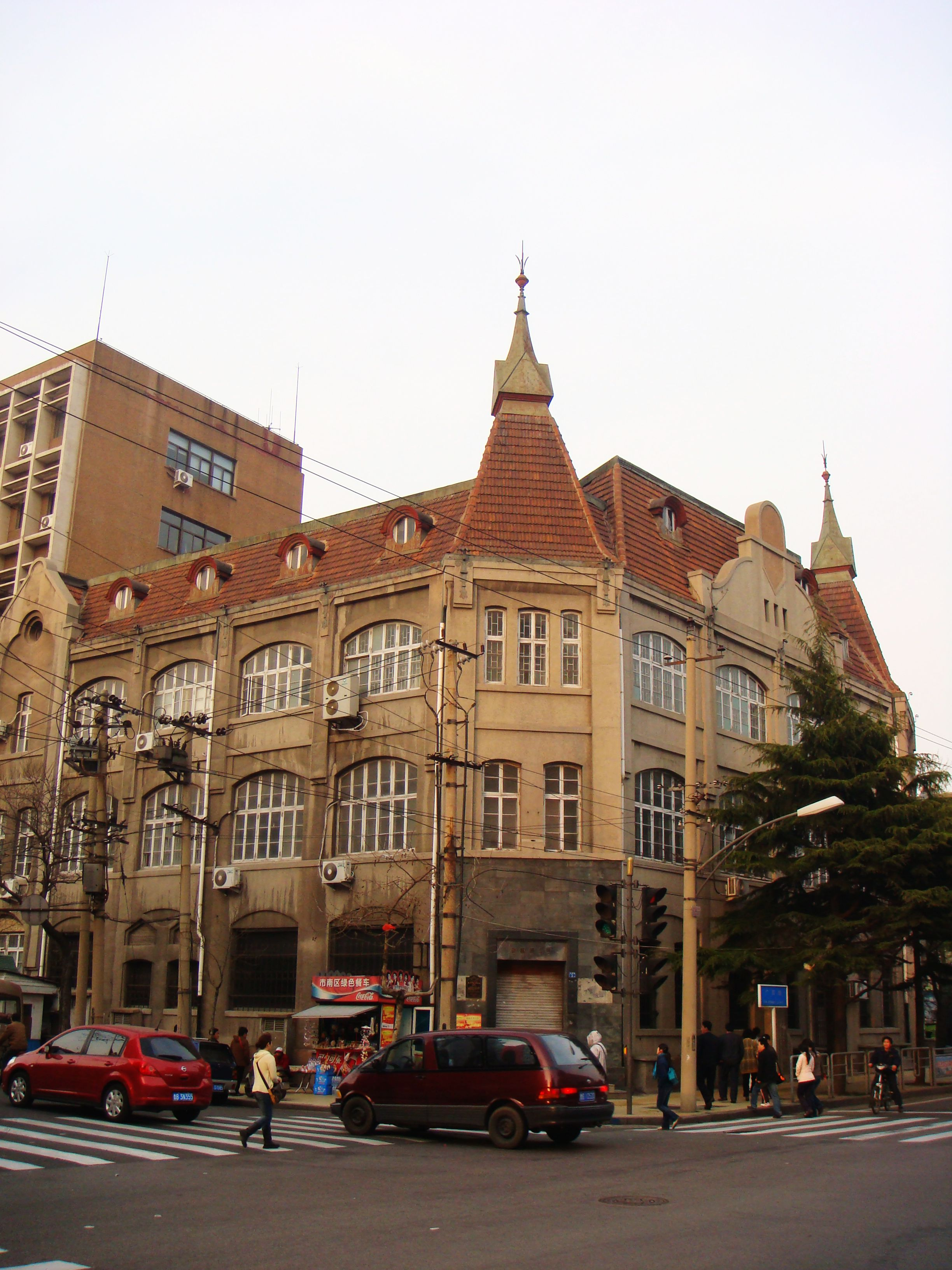 青岛市市南区安徽路5号胶澳德意志帝国邮局旧址，今青岛邮电博物馆。